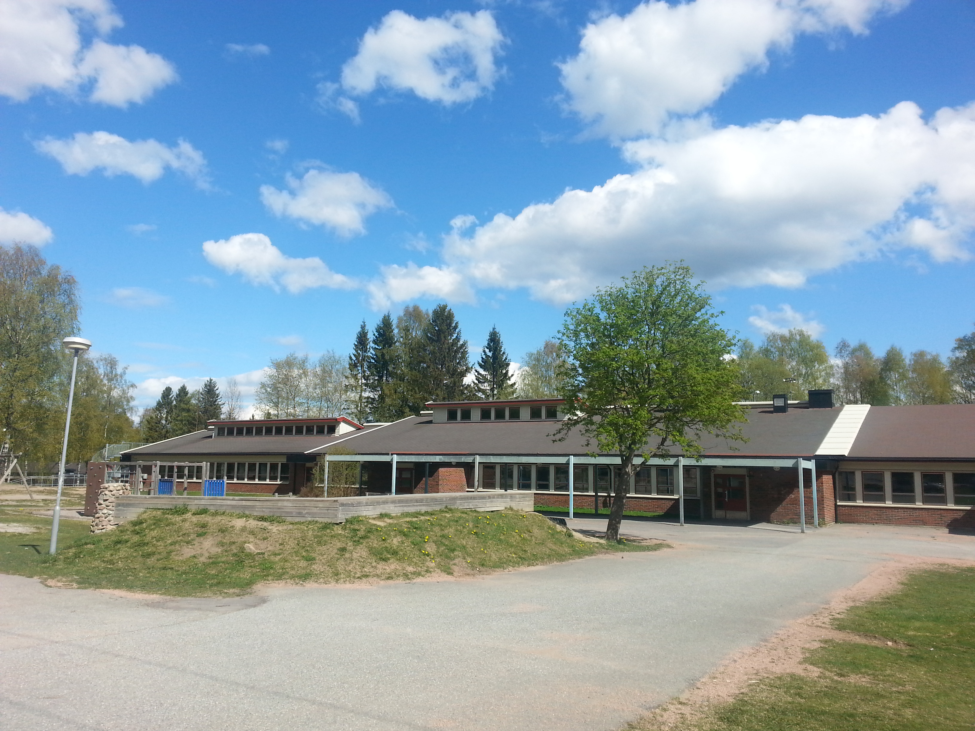 Ebbestad skole i Svelvik.